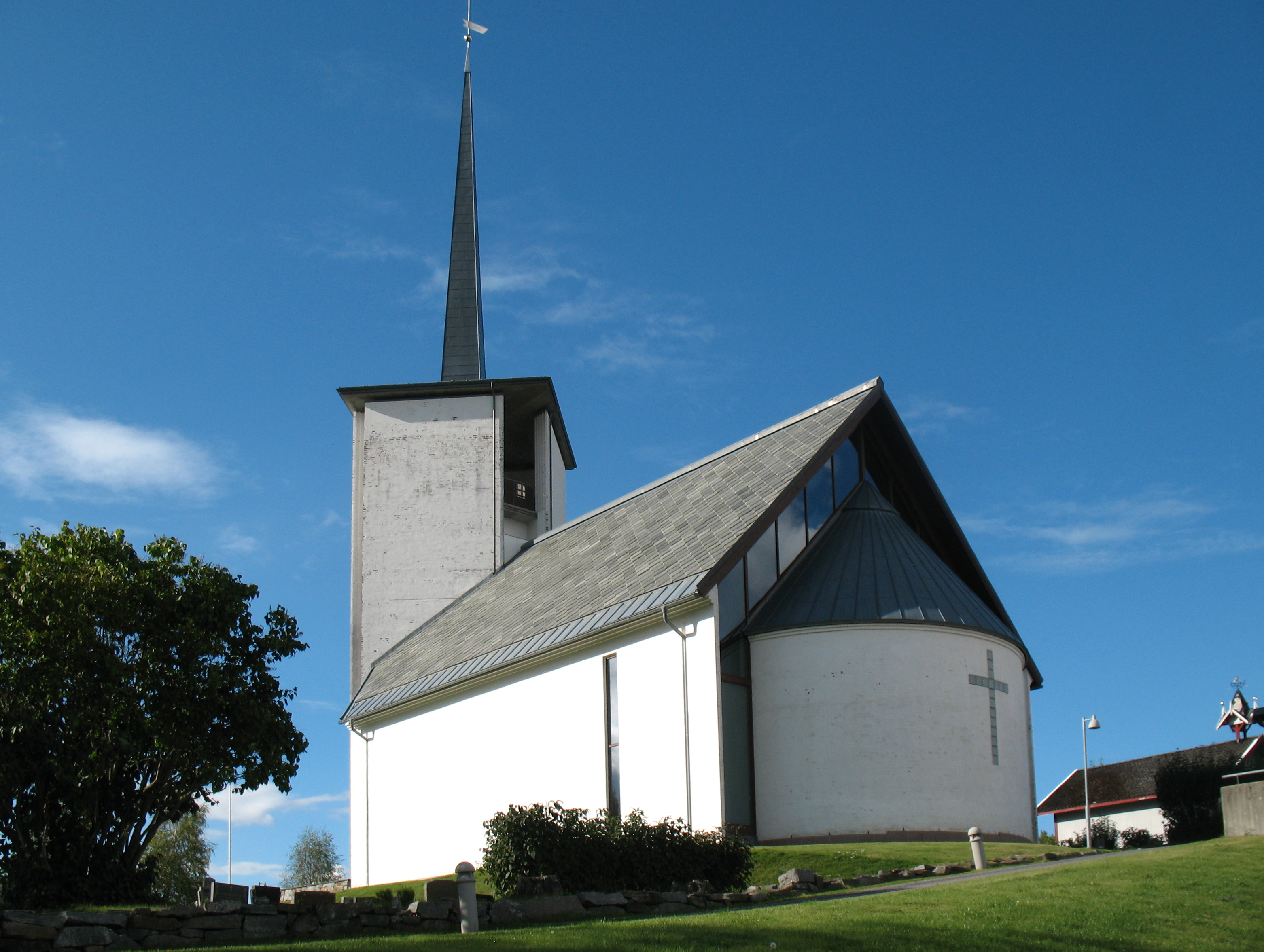 Såner kirke bygd 1995 i Vestby kommune, Akershus.